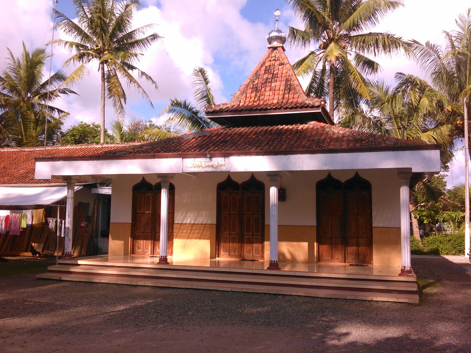 Mushalla Sabilal Muhtadin adalah salah satu tempat ibadah tertua yang ada di Desa Karangtanjung, Alian, Kebumen. Didirikan pada masa penjajahan Hindia-Belanda.